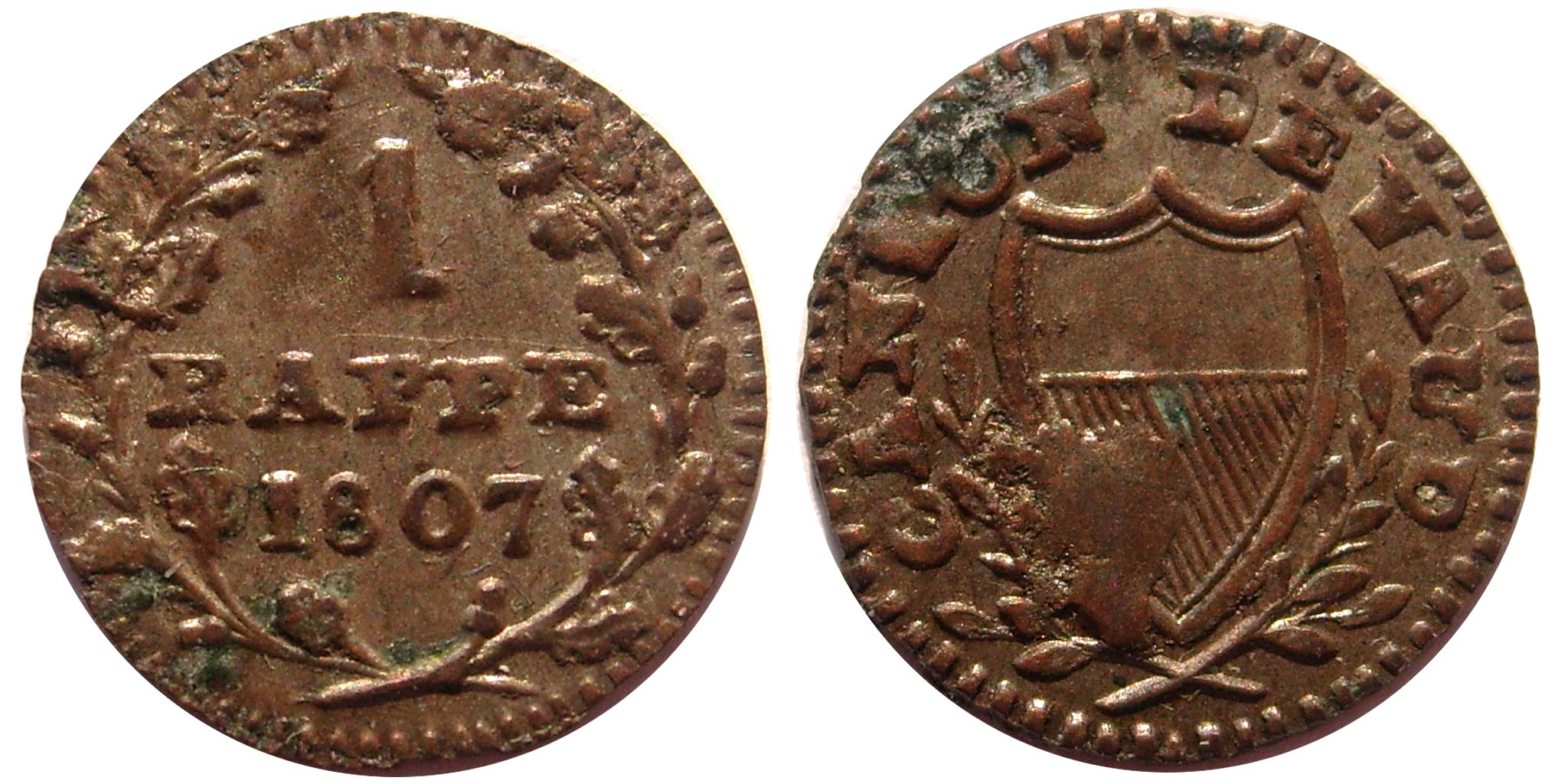 1 Rappe Vaud, Suisse, 1807